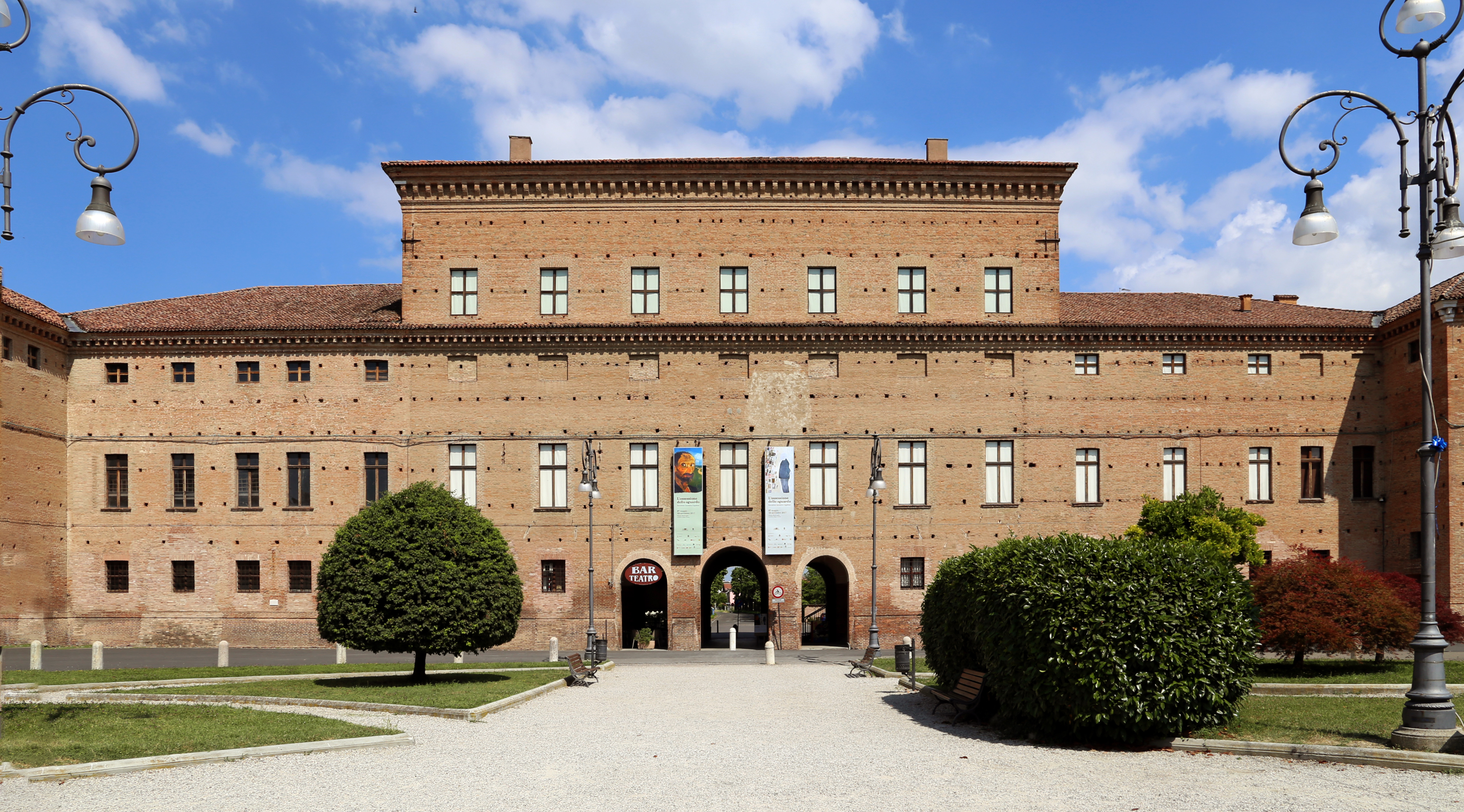 Palazzo Bentivoglio This is a photo of a monument which is part of cultural heritage of Italy.